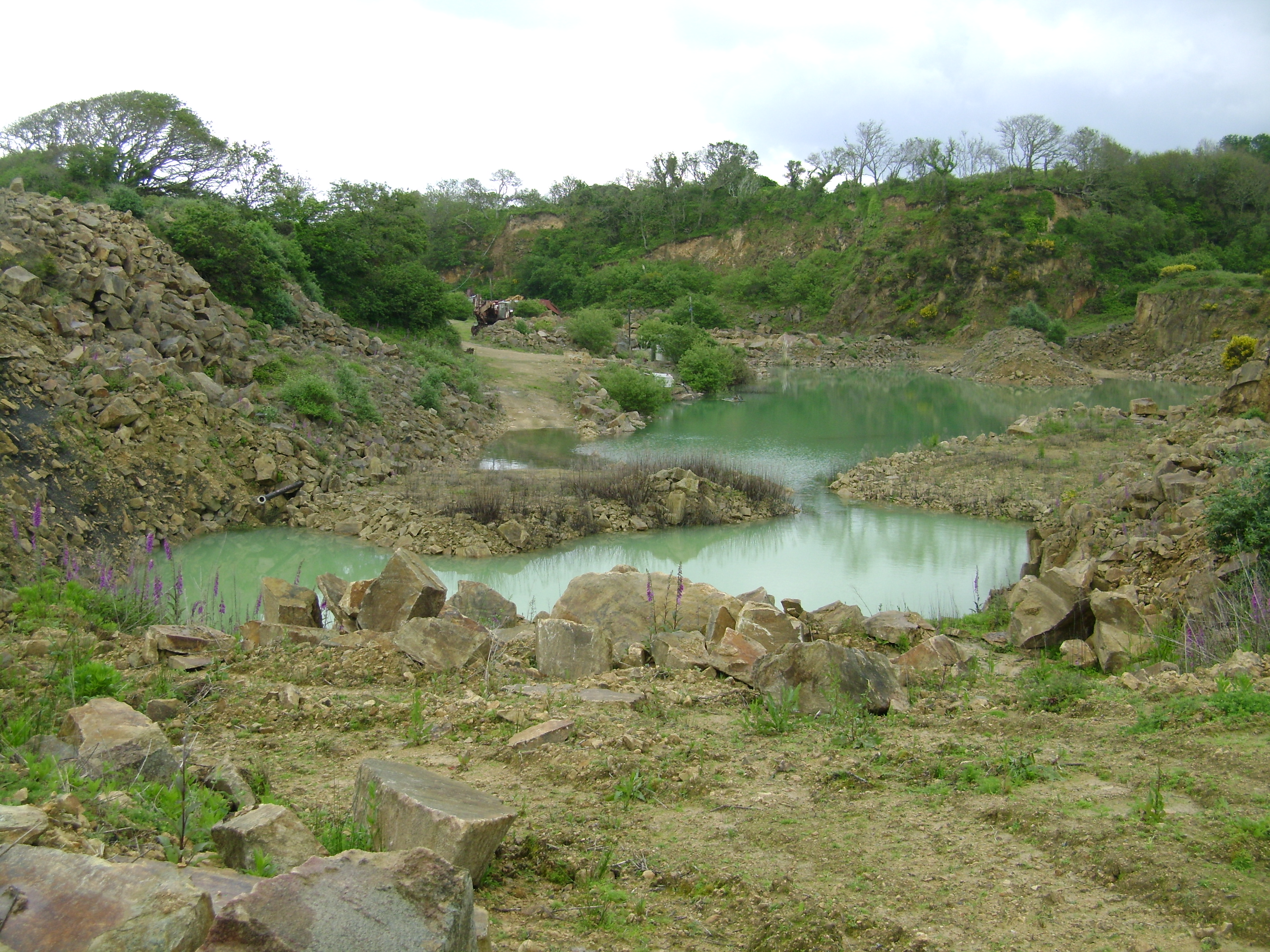 Logonna-Daoulas, carrière du Roz.JPG